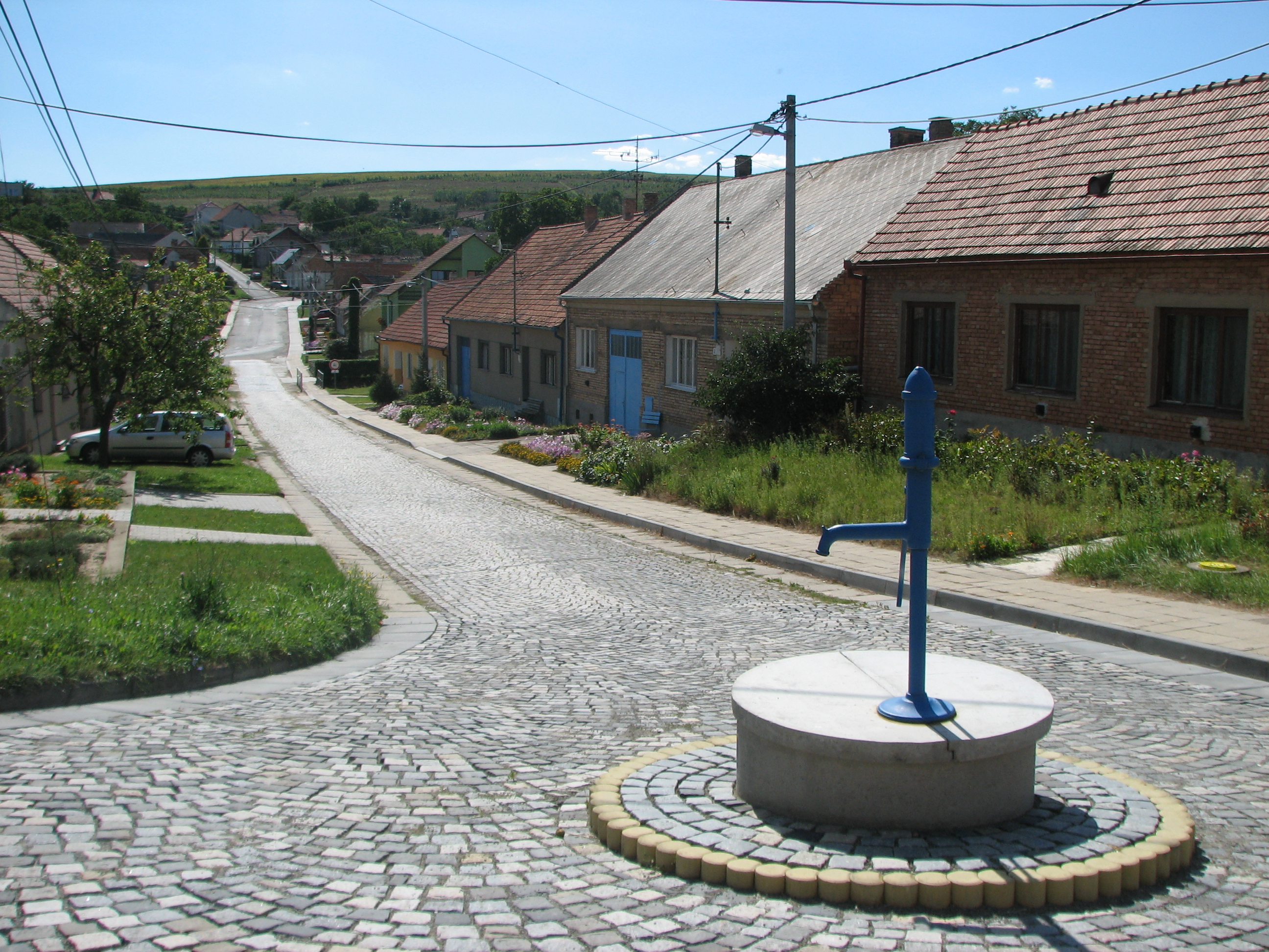 Stavěšice - ulice